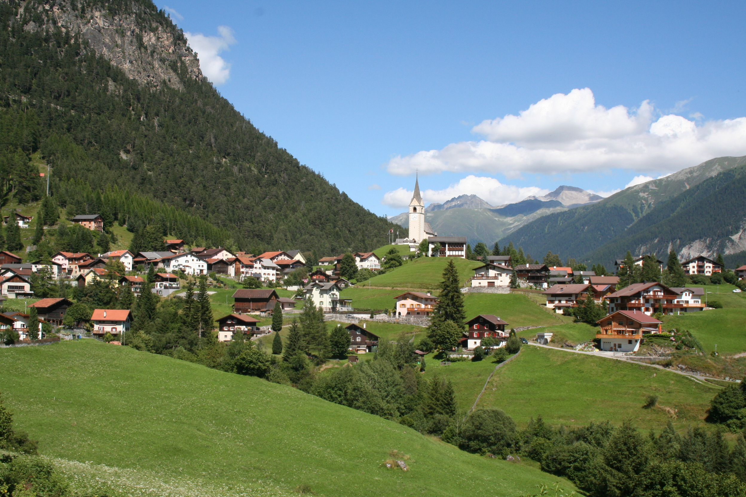 Schmitten GR